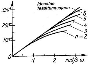 Besseli filtri faasi-sageduse tunnusjooned sõltuvalt järgust